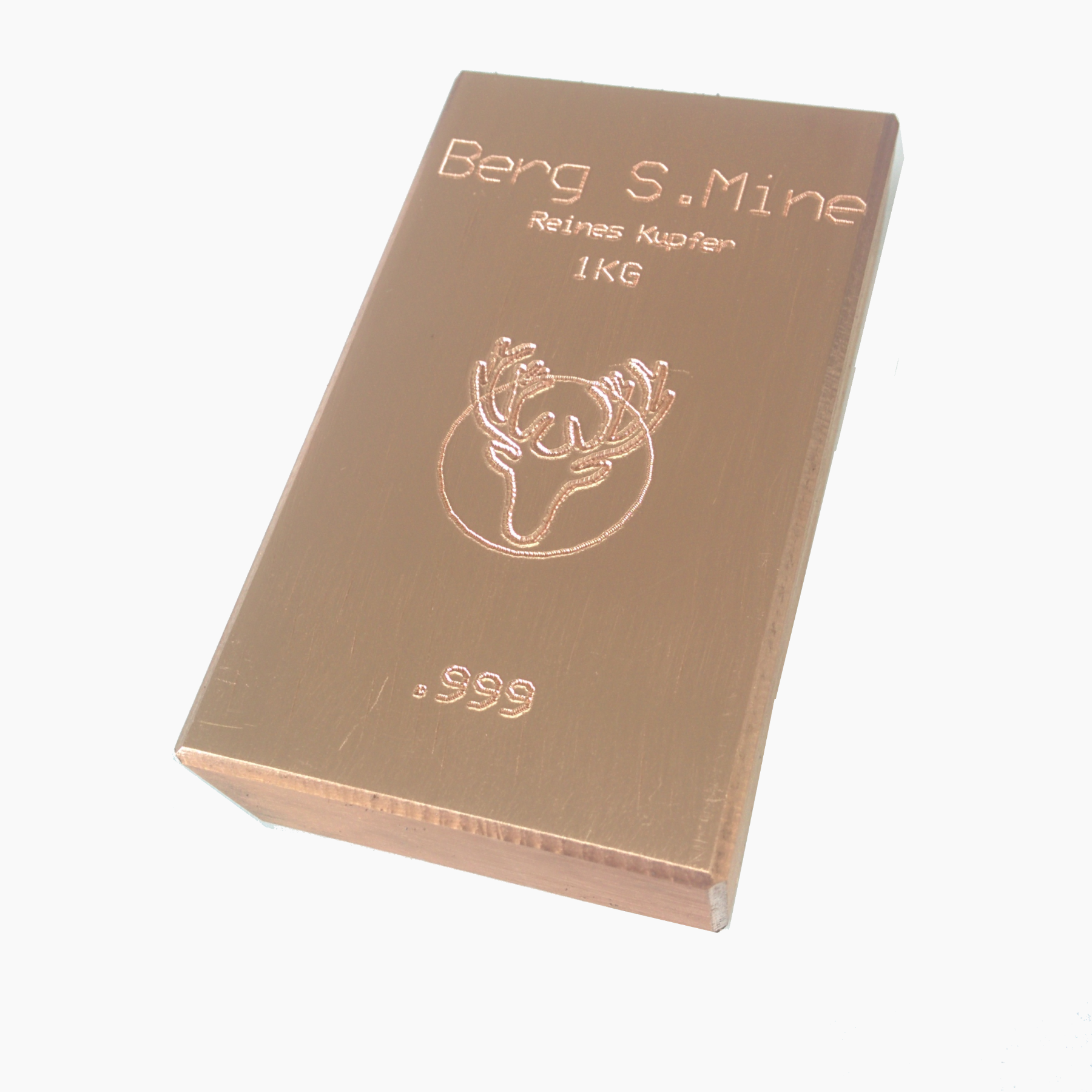 Lingot ancien restauré Poids / indice de pureté